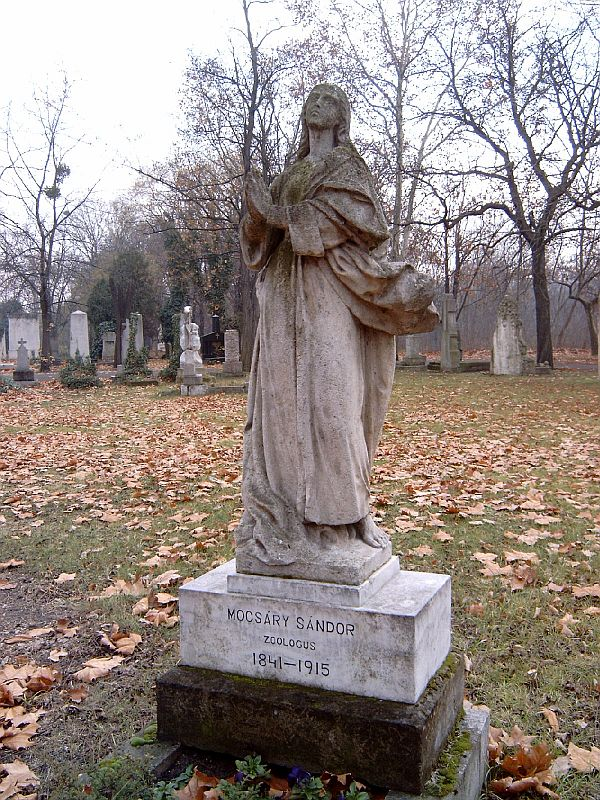 Mocsáry Sándor sírja Budapesten. Kerepesi temető: 29/1-1-28.